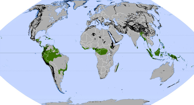 Auszug der Karte Ökozonen nach Jürgen Schultz